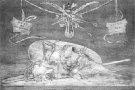 9.2 maximi certaminis victoria